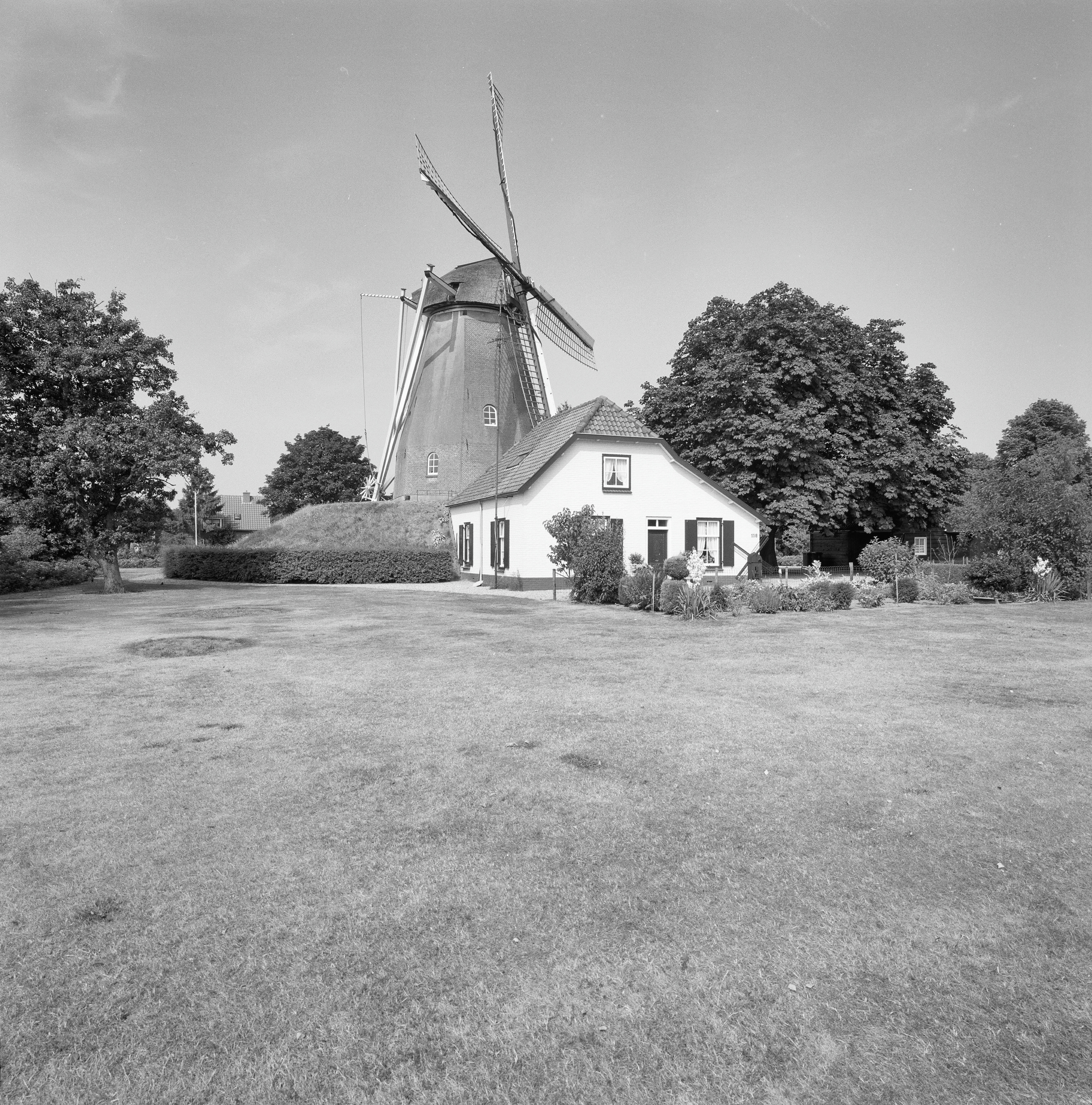 MOLEN DE KEETMOLEN: Exterieur OVERZICHT MOLEN EN MOLENHUIS